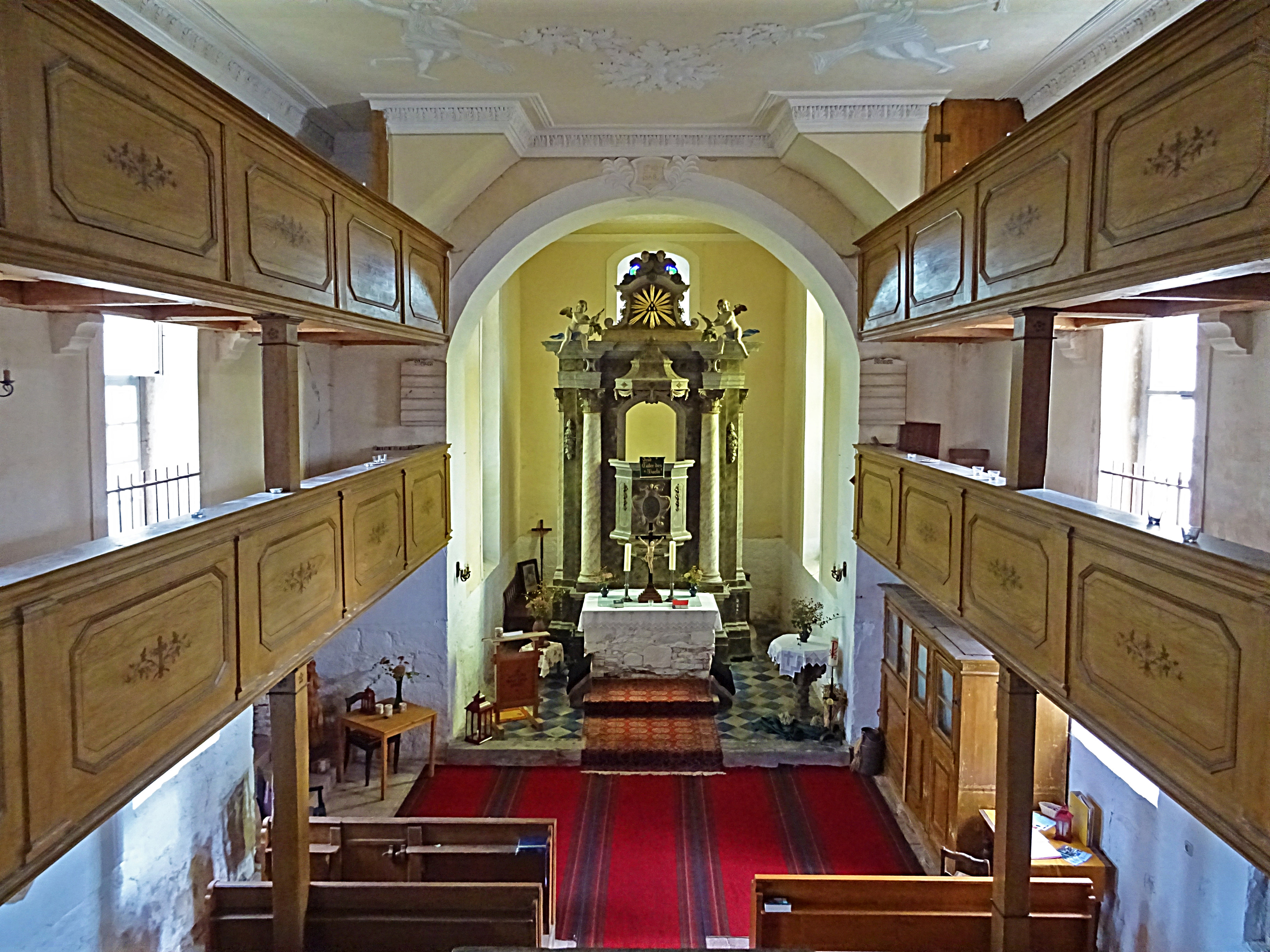 Blick zum Altar in der Dorfkirche Kopitzsch